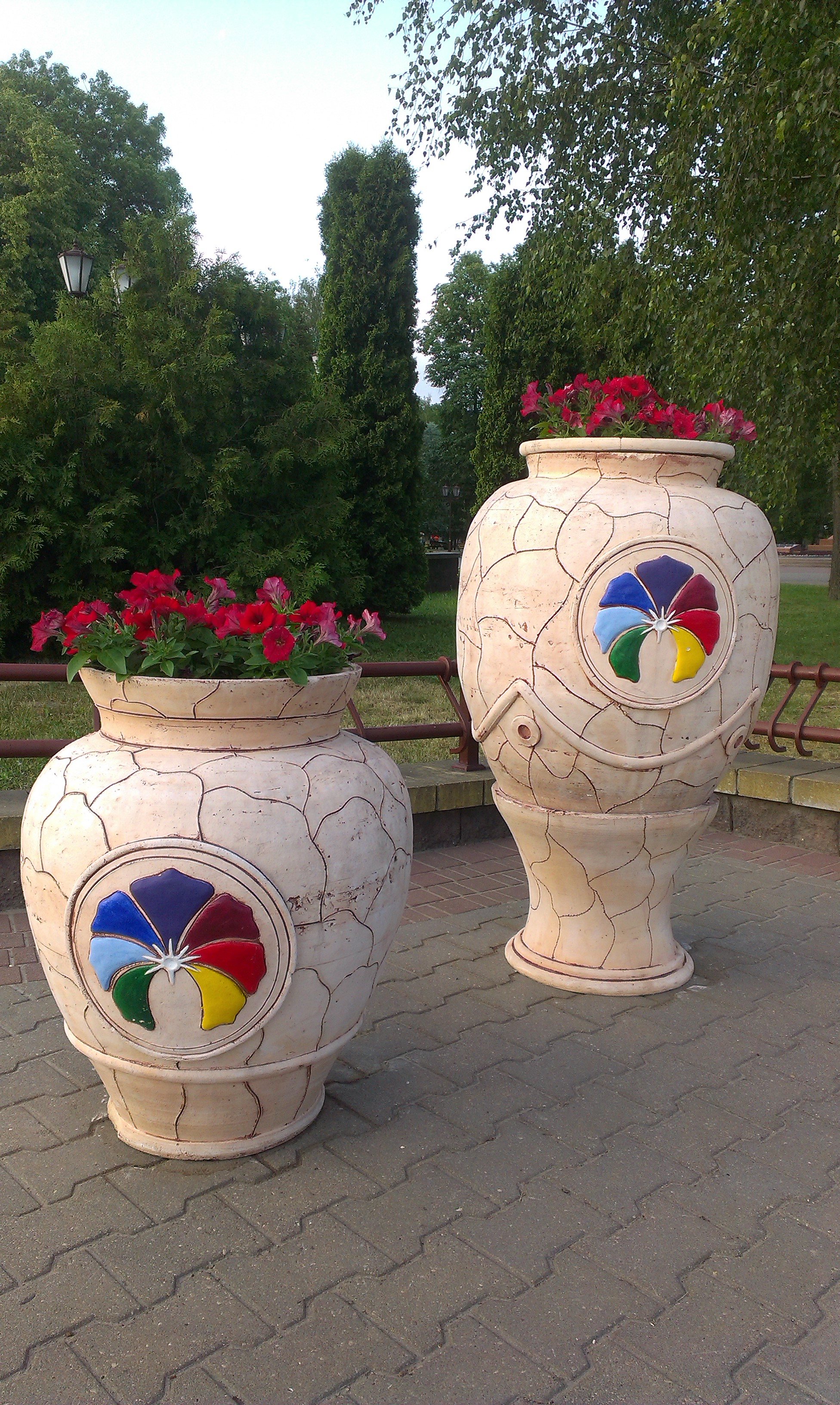 Упрыгожванне горада сімволікай XI Рэспубліканскага фестывалю нацыянальных культур у Гродна.